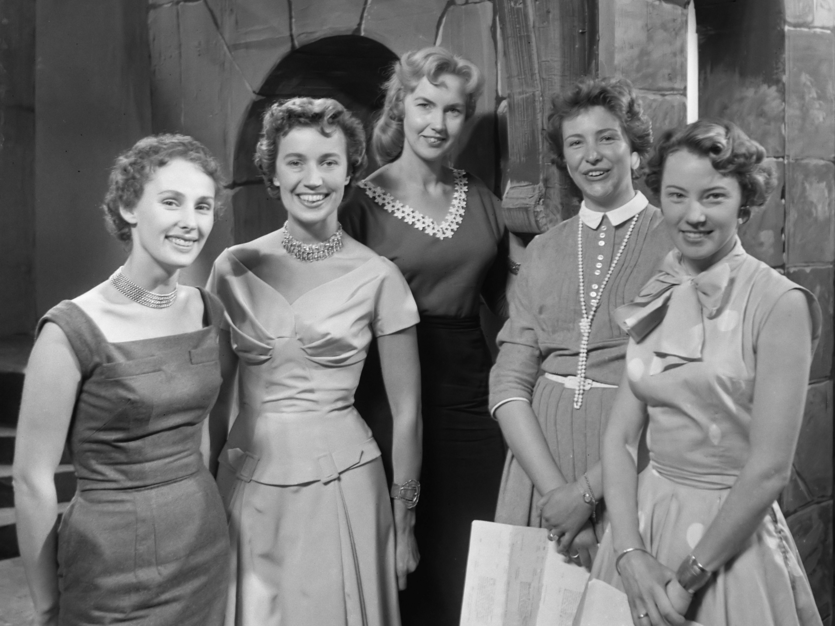 Vijf jaar televisiestichting, de omroepsters, vlnr Tanja Koen (NCRV), Hannie Lips (KRO), Verti Dixon (VPRO), Ageeth Scherphuis (AVRO) en Karin Kraaykamp (VARA) 2 oktober 1956